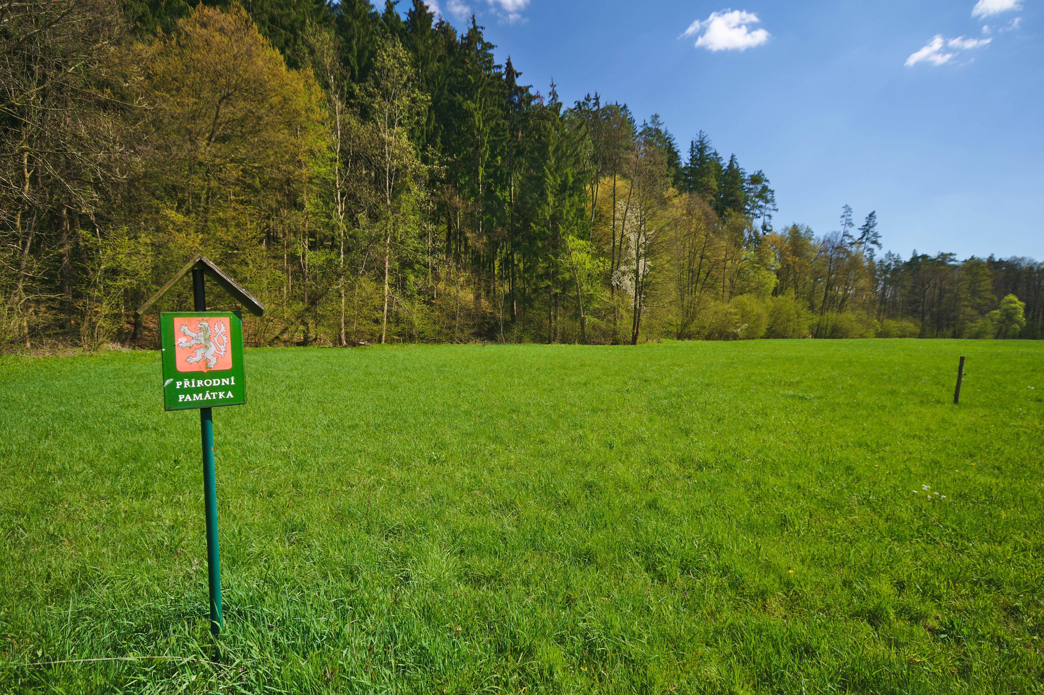 Přírodní památka Smolinka, okres Zlín